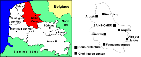 Carte de l'arrondissement de Saint-Omer (62) avec chefs-lieux de cantons Utilisateur:Manchot sanguinaire